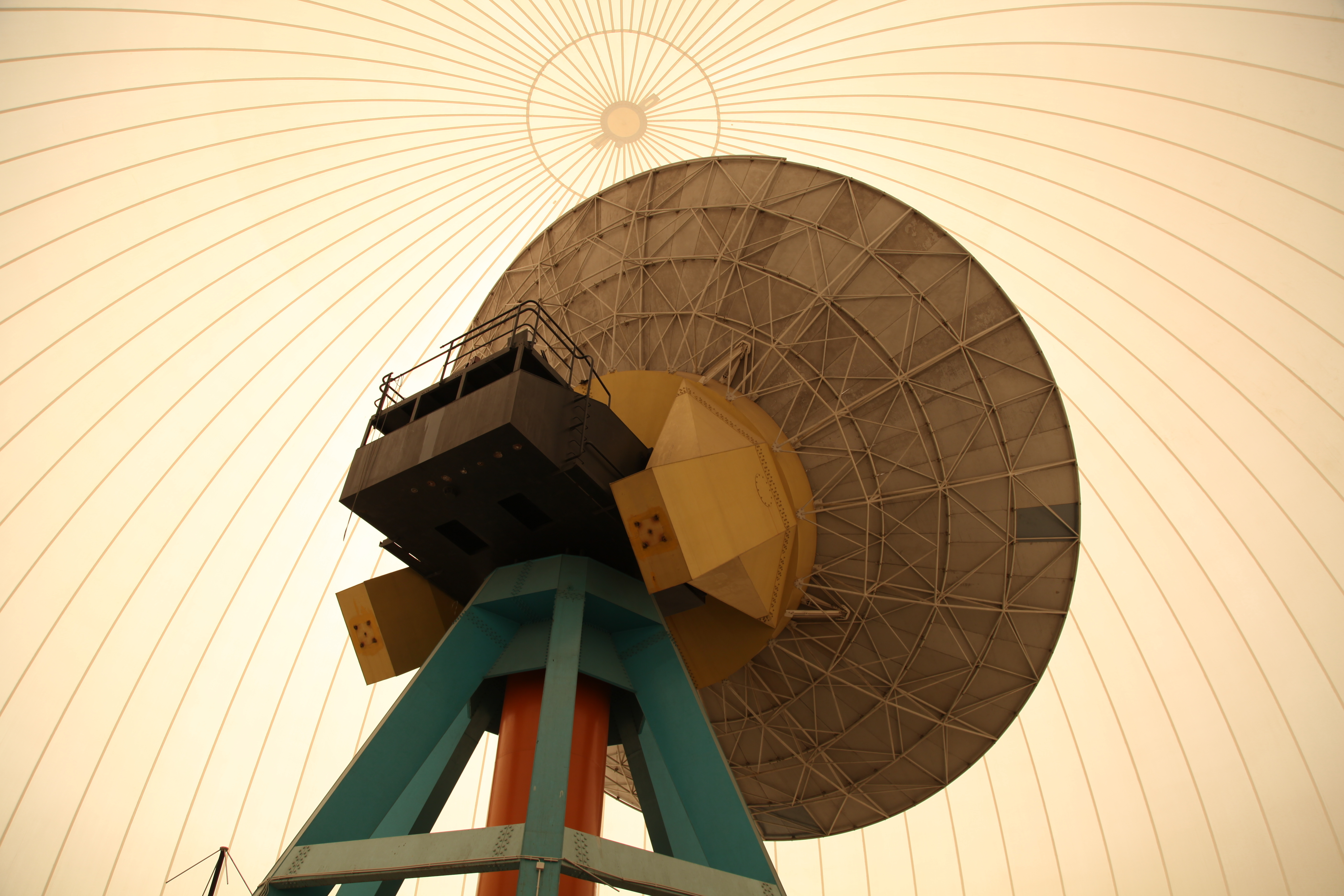 Sternwarte Bochum an der Blankensteiner Straße in Bochum